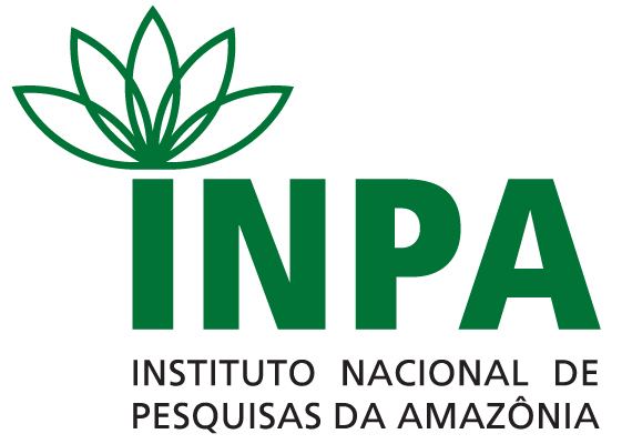 Identidade visual do INPA